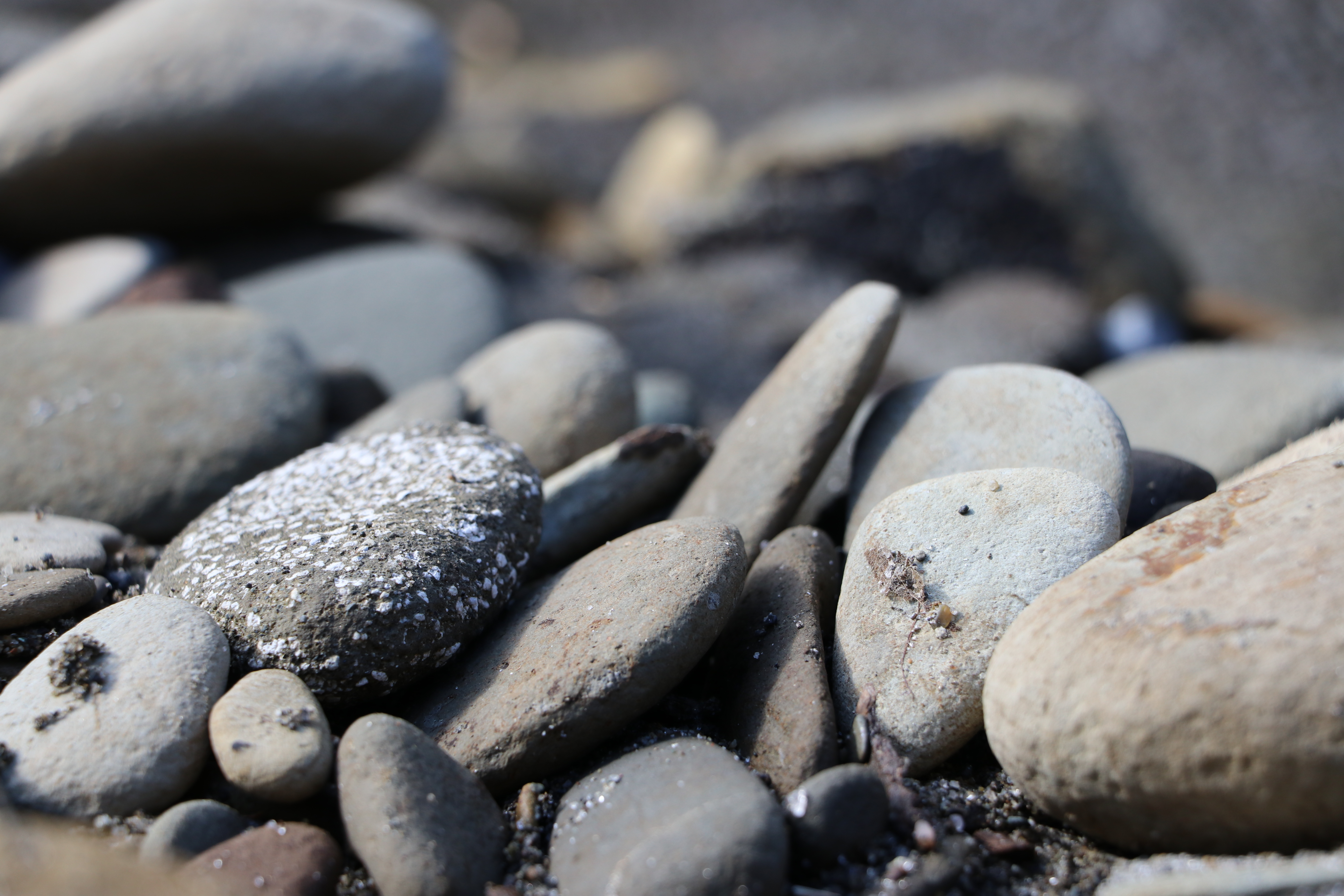 大雨による増水後に養老川岸において見られた小規模のインブリケーション